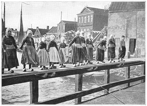 Oolijke Volendamsche deerntjes